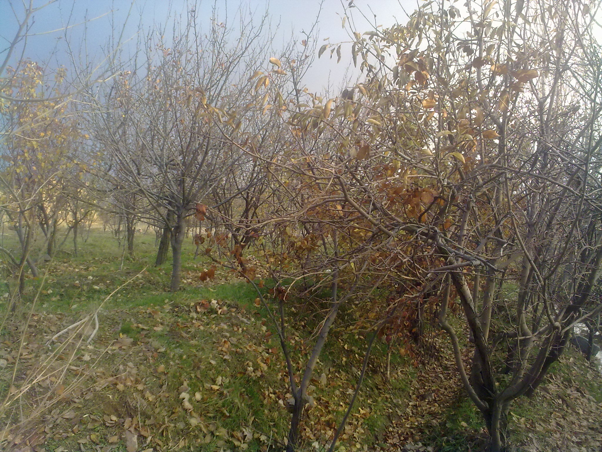 طبیعت روستا